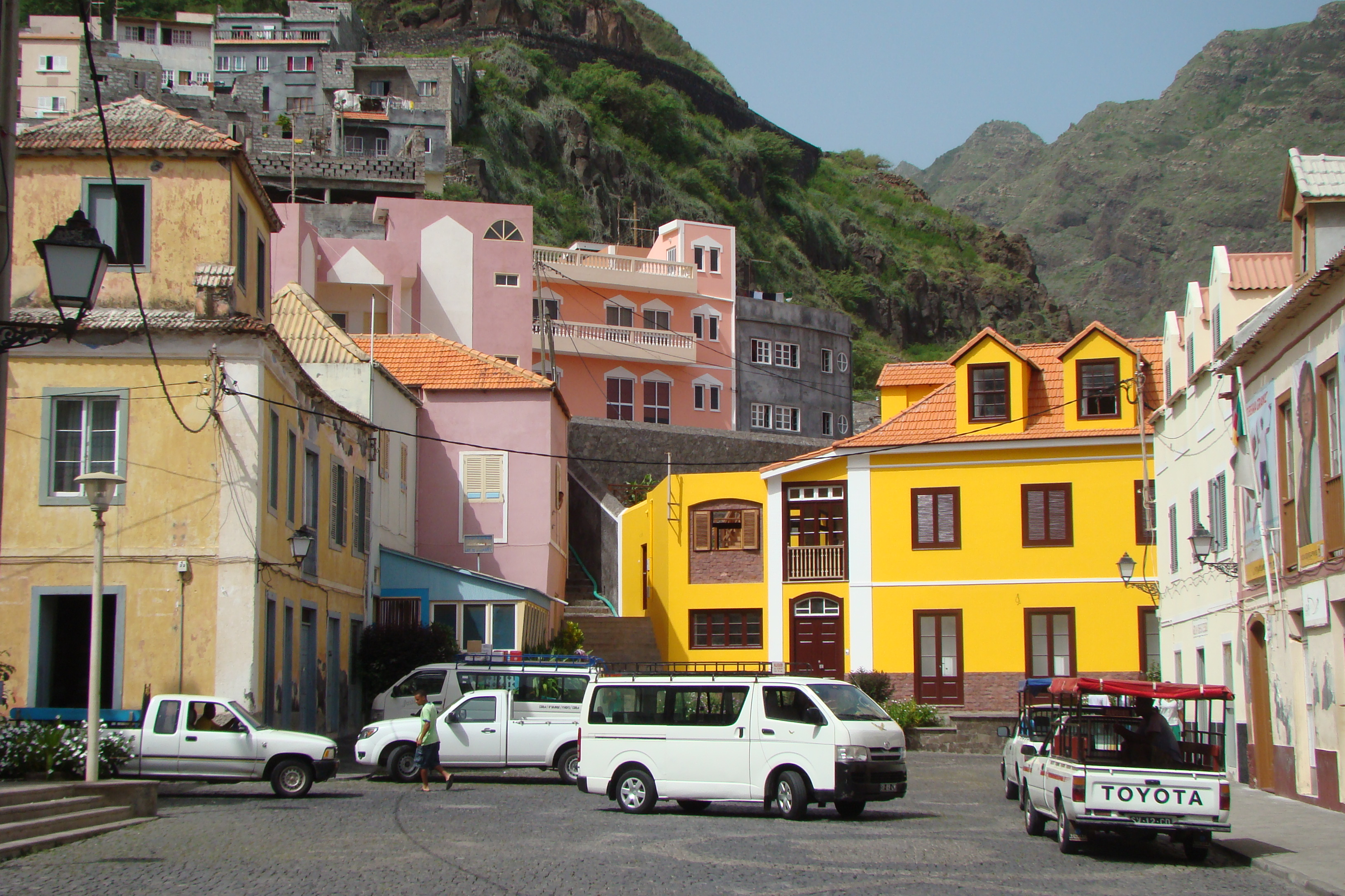 alugueres esperando viajeros en Ribeira Grande